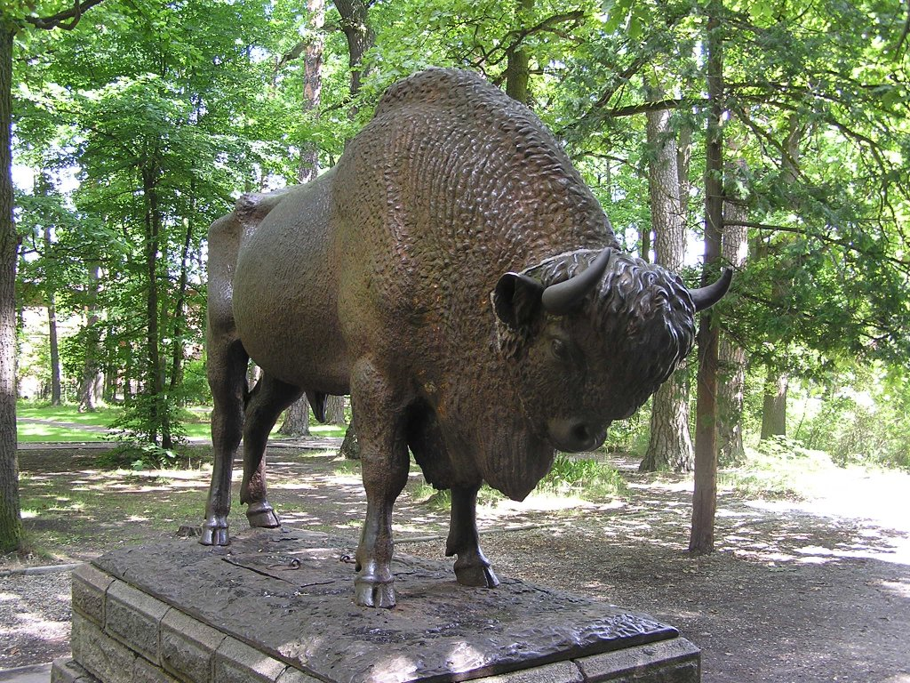 Spalski Żubr